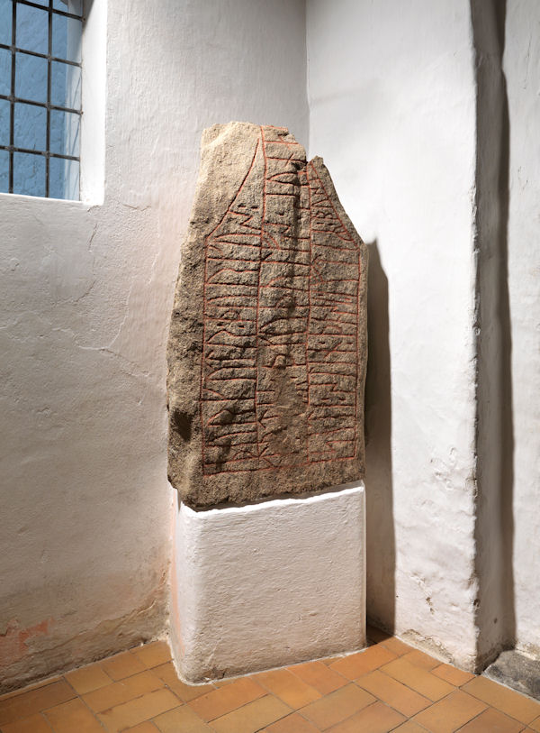 Foto af Roberto Fortuna